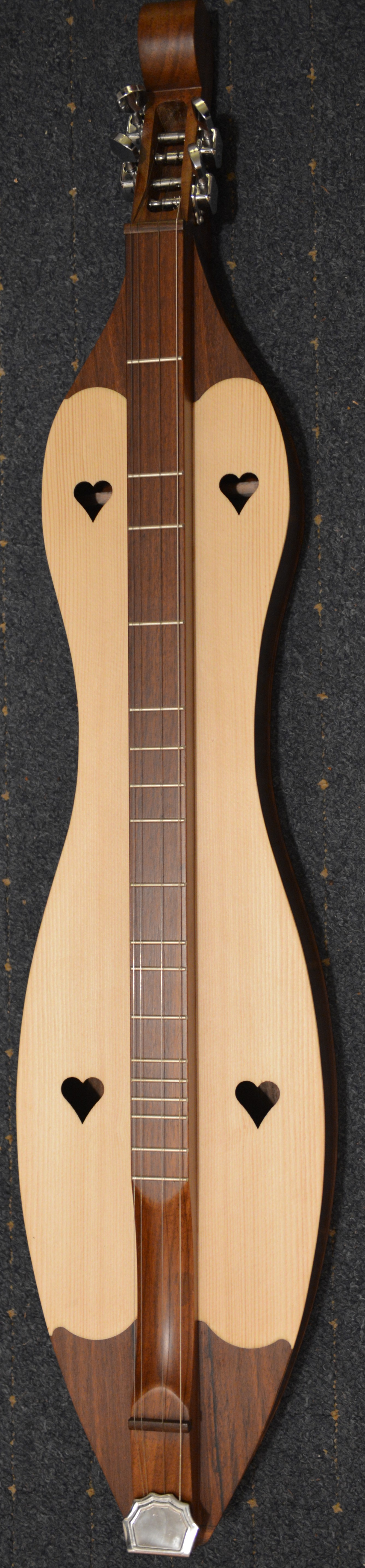 Ett instrument, en Appalachian dulcimer.